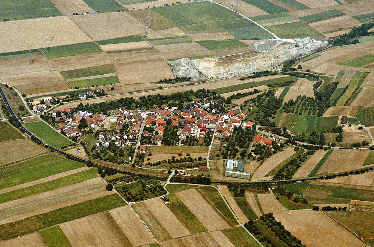 Hardt- und Schönbühlhof bei Markgröningen von Südwesten (Ausschnitt)]